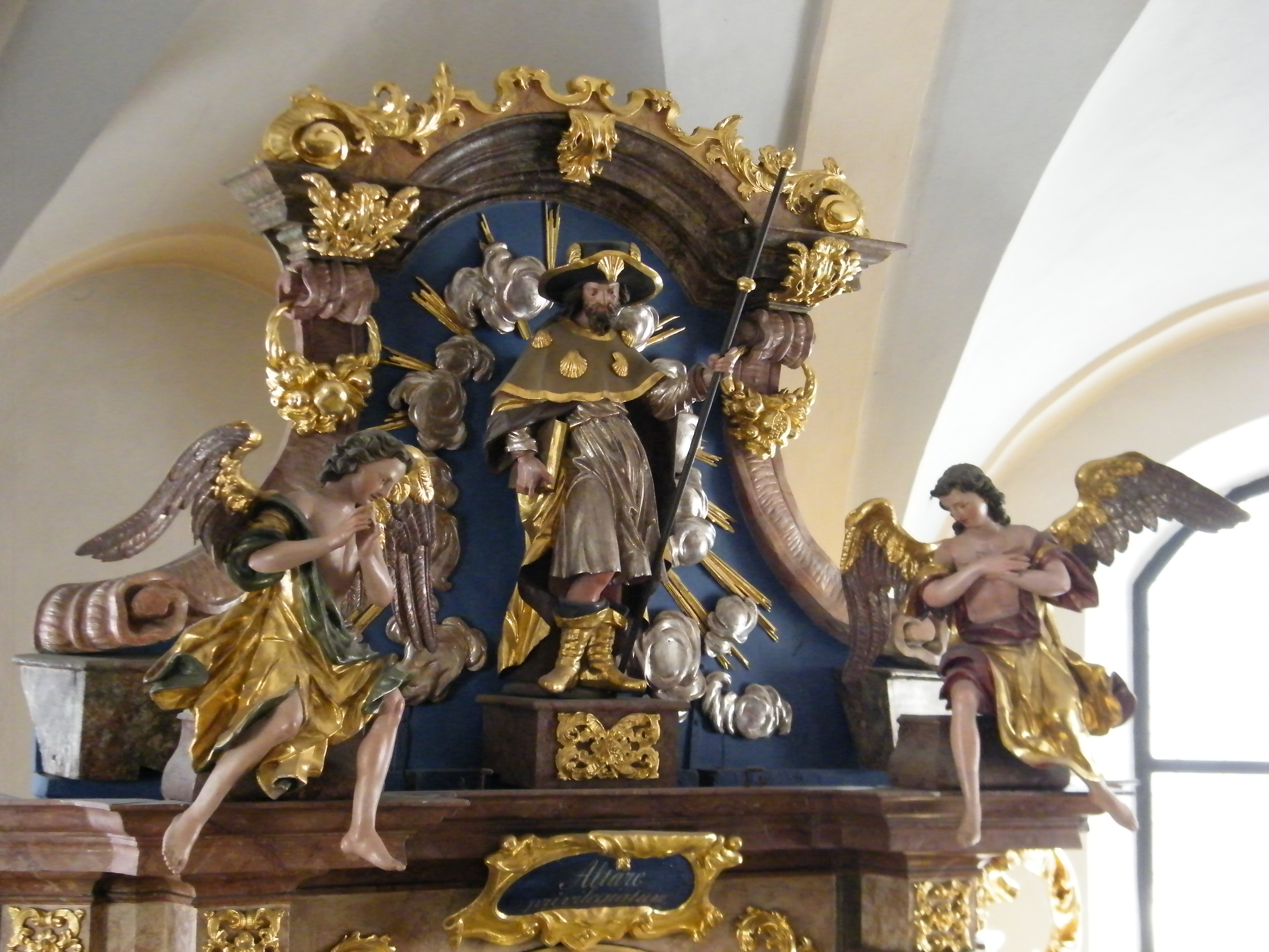 hl. Jakobus mit Pilger-Attributen und Adorationsengel, um 1716, Faistenau